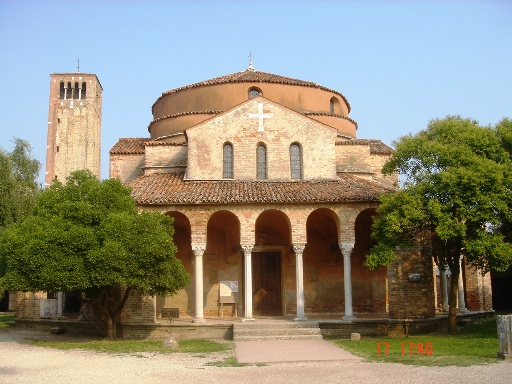 Chiesa di Santa Fosca